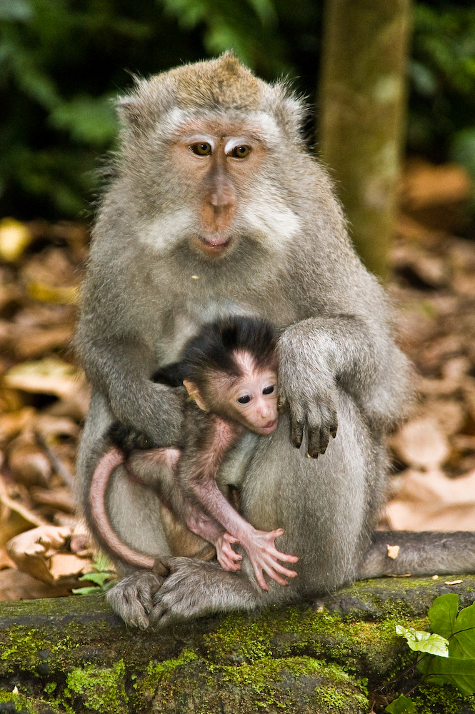 macaca fascicularis (monkey Forest, Ubud, Bali, Indonesia)